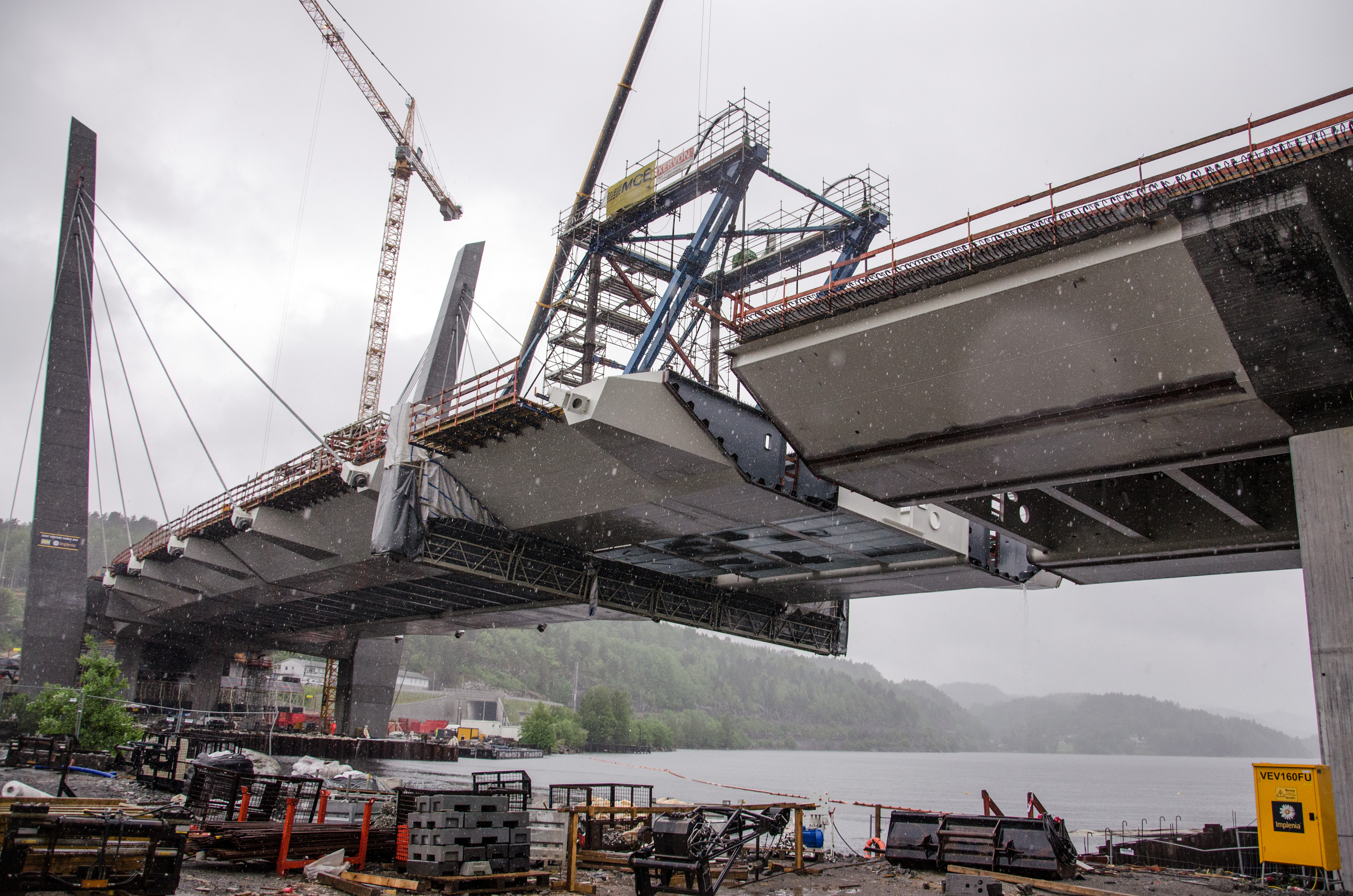 Farrisbrua